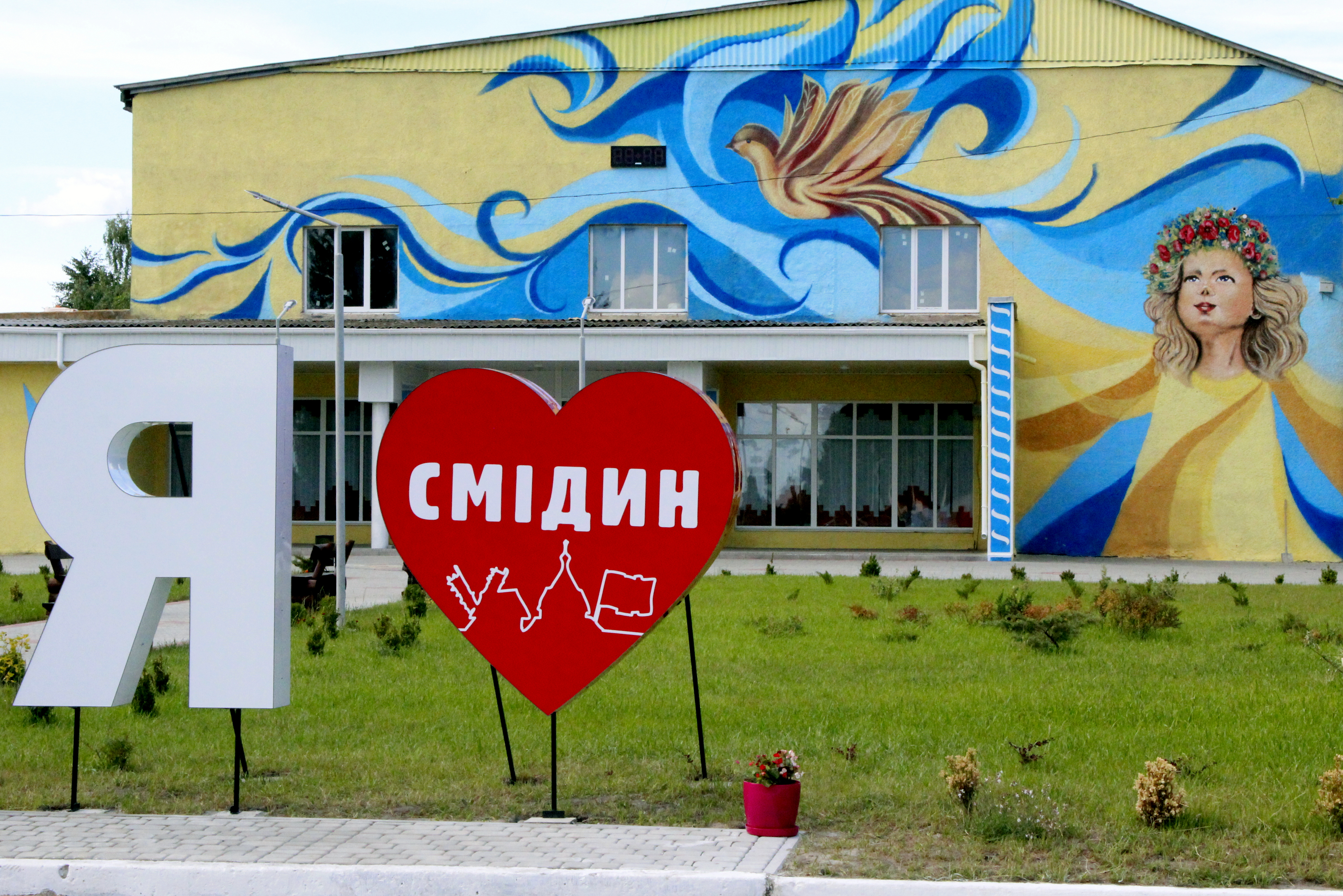 Інсталяція поряд з Смідинським будинком культури